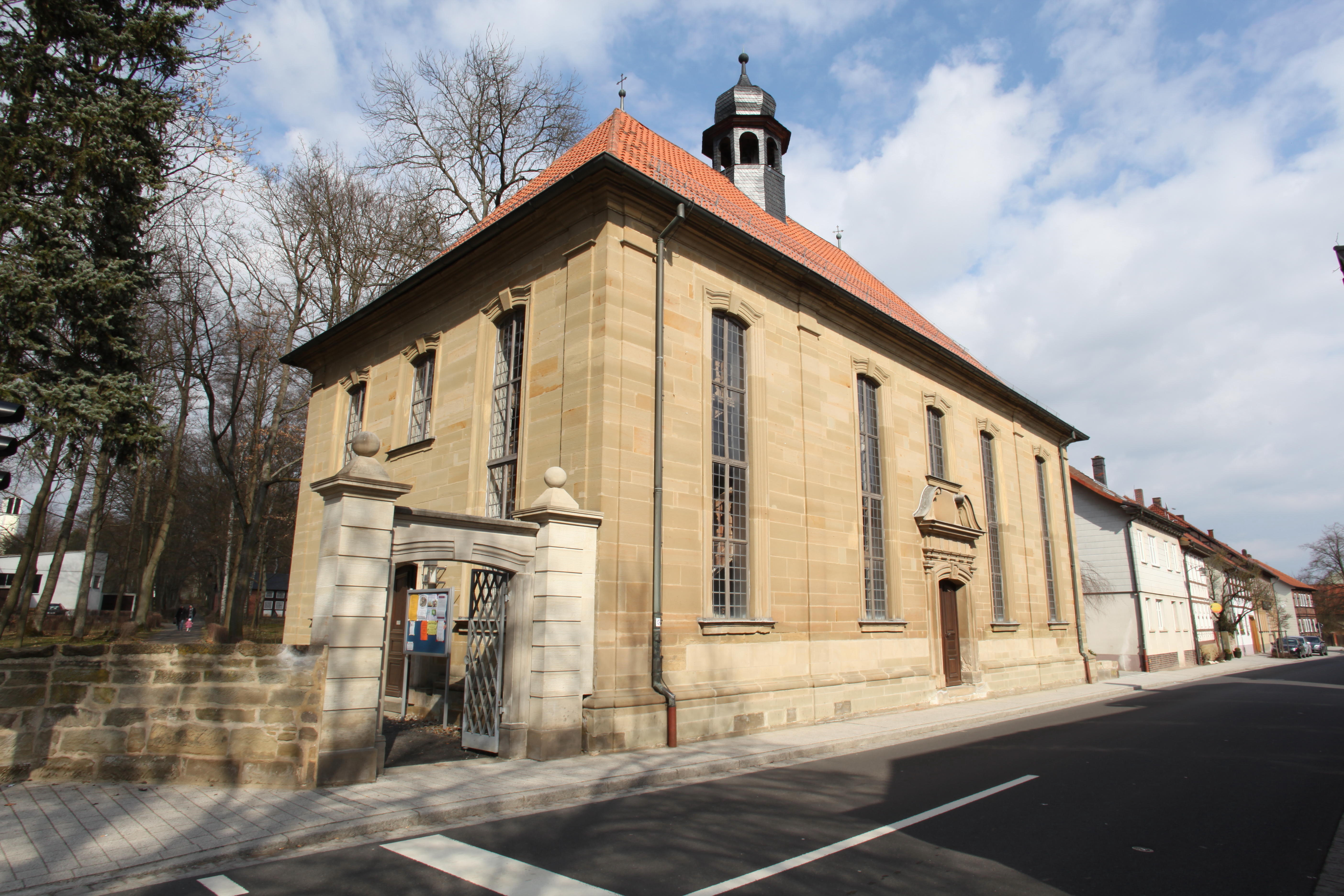 Evangelisch-Lutherische Salvatorkirche in Bad Rodach, Landkreis Coburg